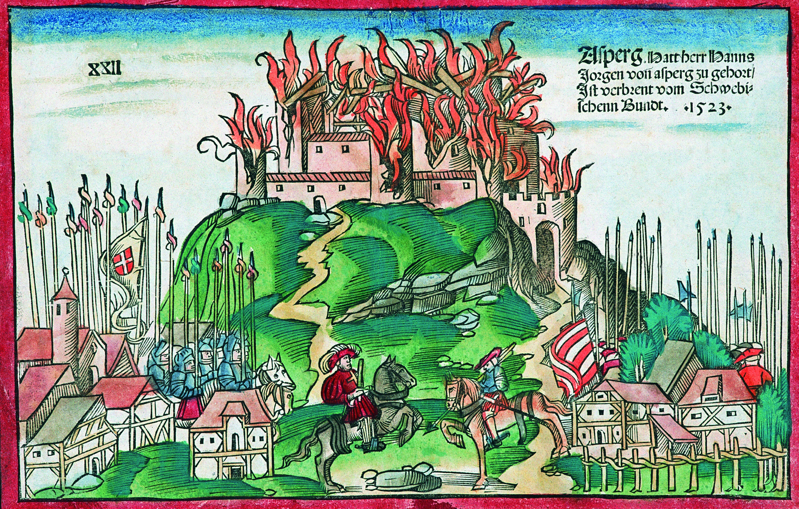 Bild aus dem Burgenbuch der Staatsbibliothek Bamberg, Staatsbibliothek Bamberg, RB.H.bell.f.1